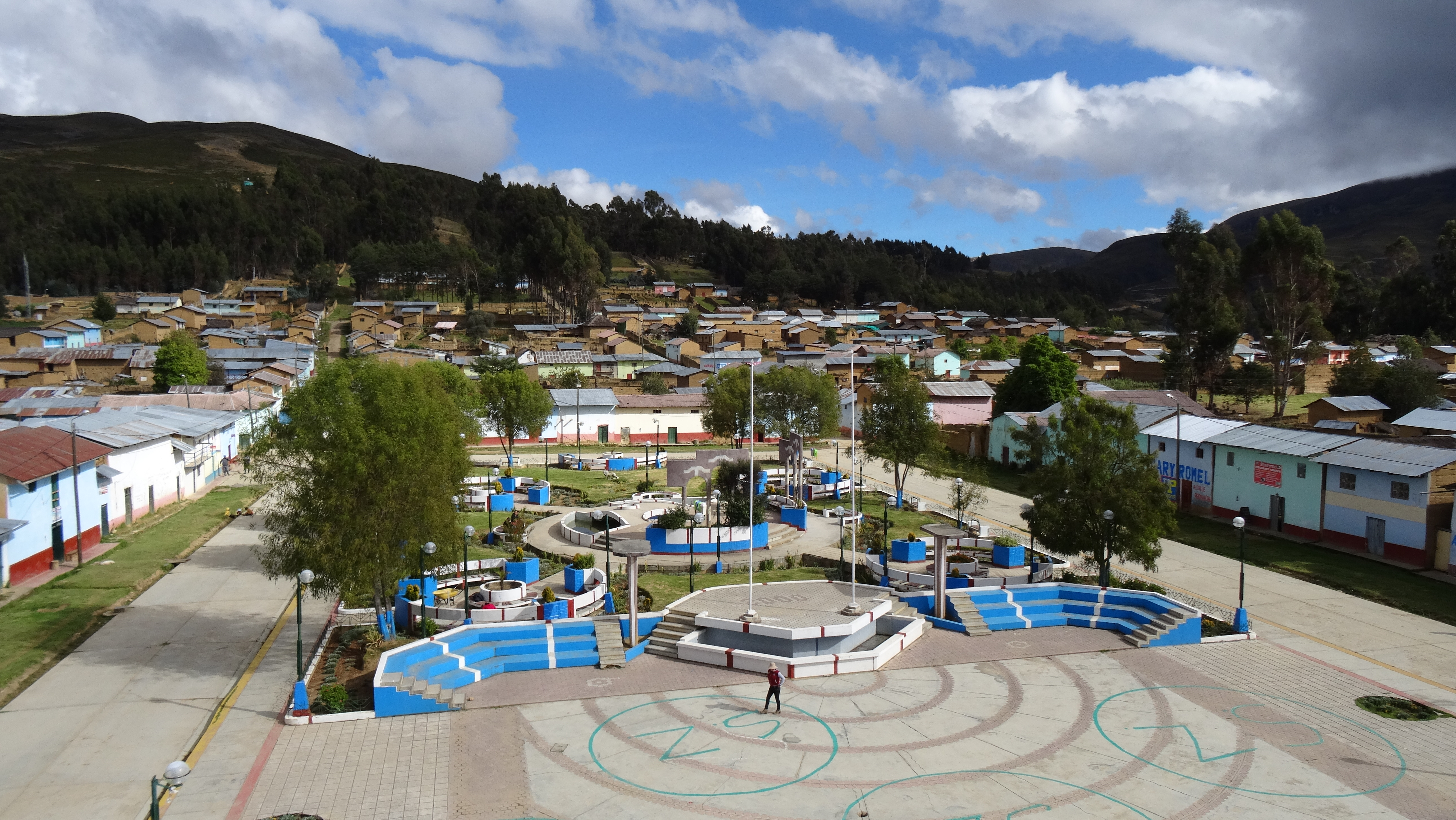 La Plaza de Armas del núcleo urbano del distrito de Rondos desde el techo de la municipalidad.